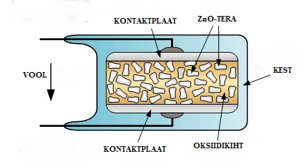 Varistori läbilõige